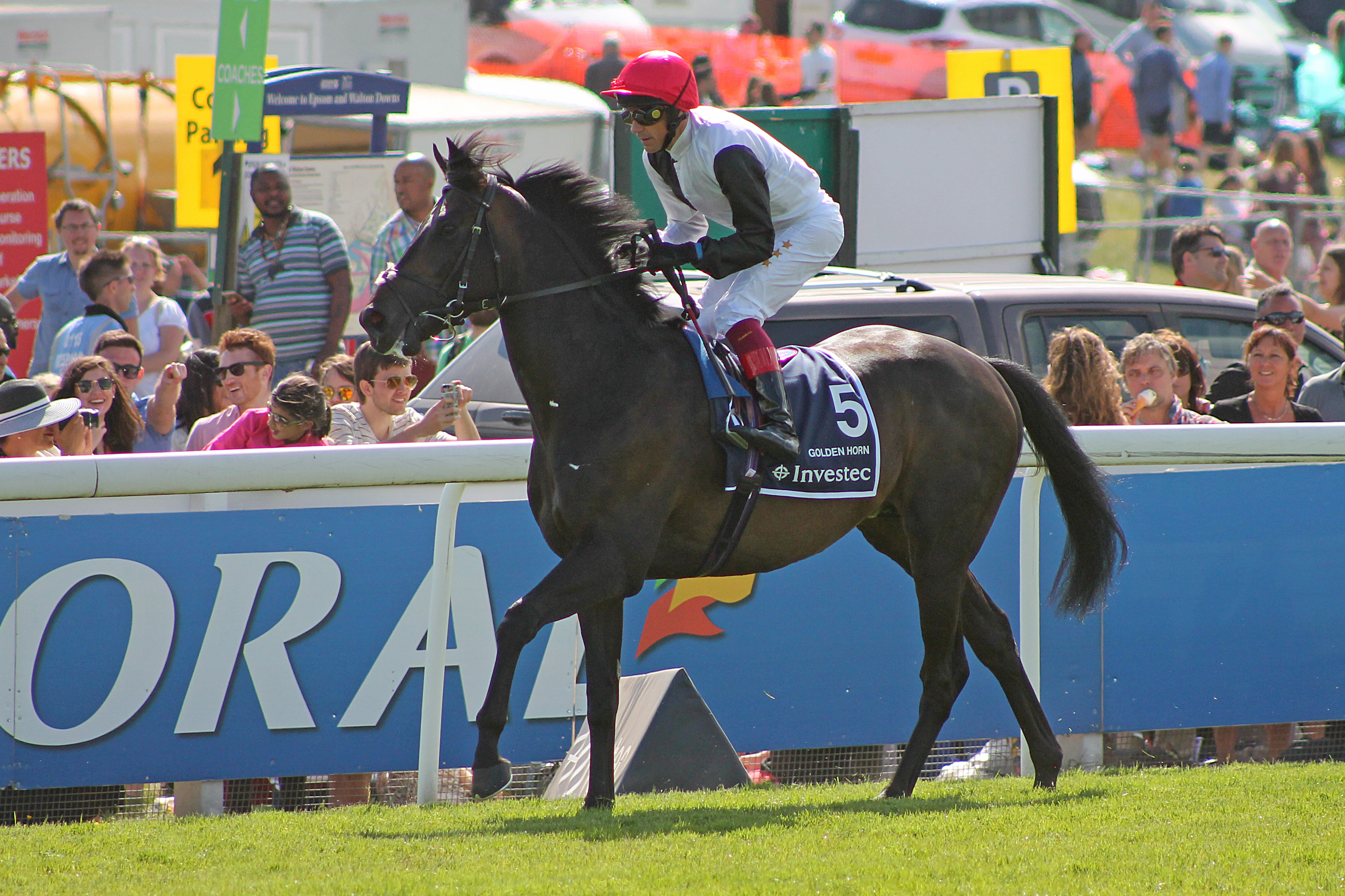 034 Epsom Derby 2015 - Golden Horn and Frankie Dettori going to post Epsom Derby